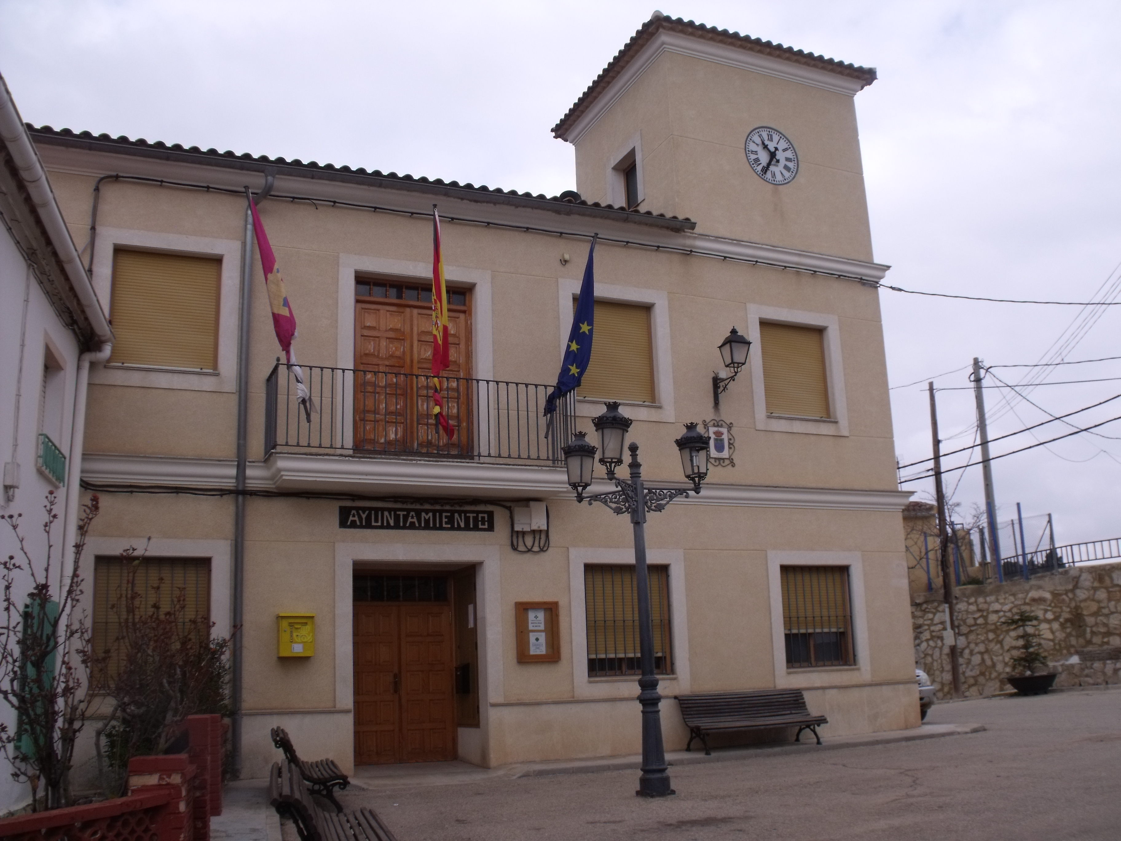 Ayuntamiento.